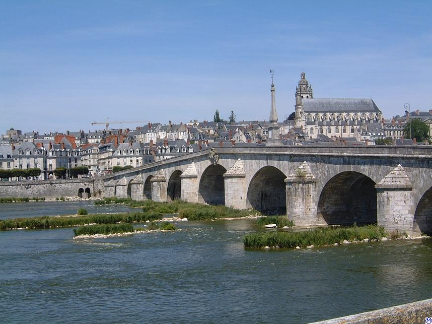 Blick auf Blois mit Loirebrücke Bild:Blois.Loirebruecke.wmt.jpg